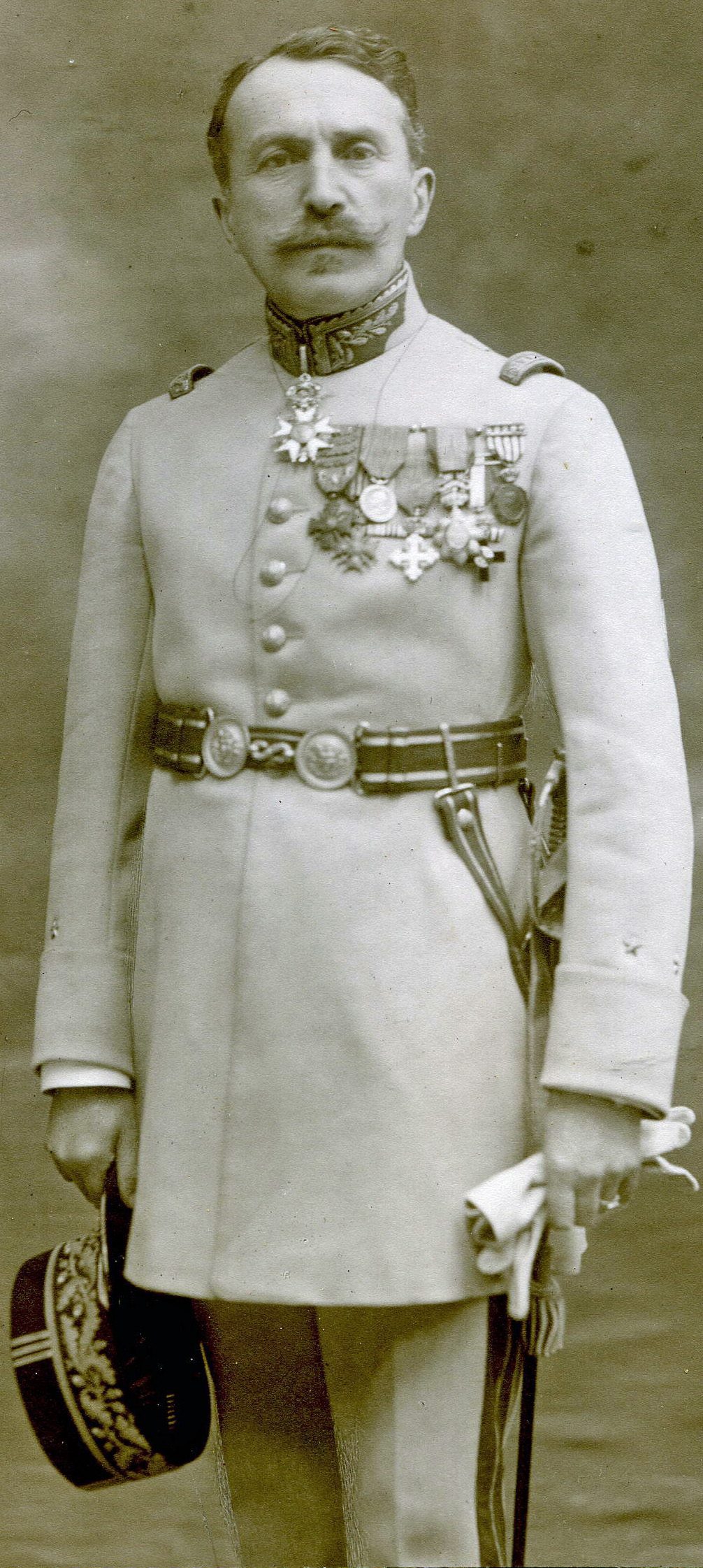 PORTRAIT DU CHEF DE CORPS QUI A ENELVE LA POSITION ALLEMANDE DE TAHURE EN 1915 A LA TETE DU 65° REGIEMENT D' INFANTERIE. GUERRE DE 1914/ 18